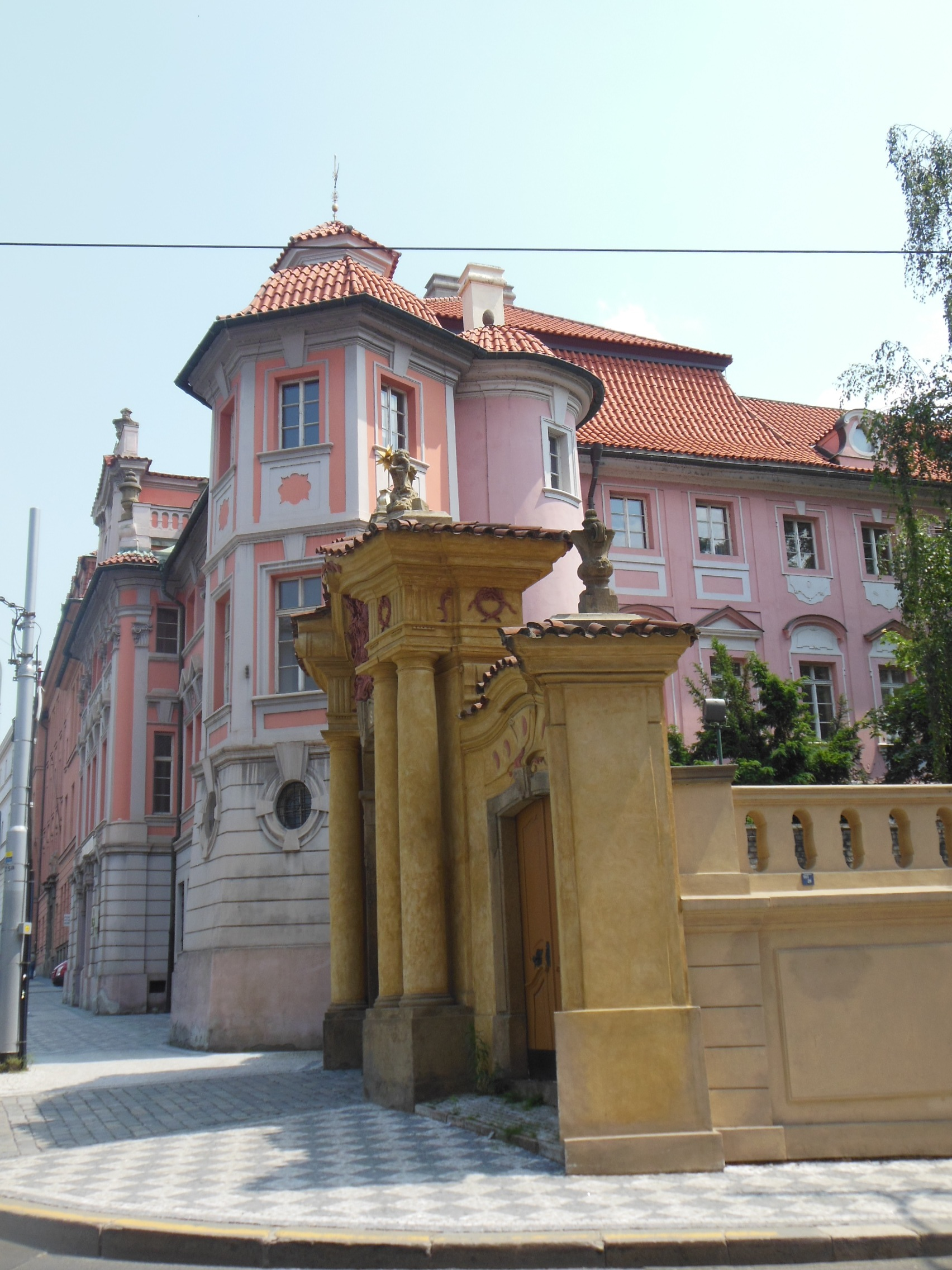 Faustův dům č. 502/40 na Karlově náměstí na Novém Městě v Praze.